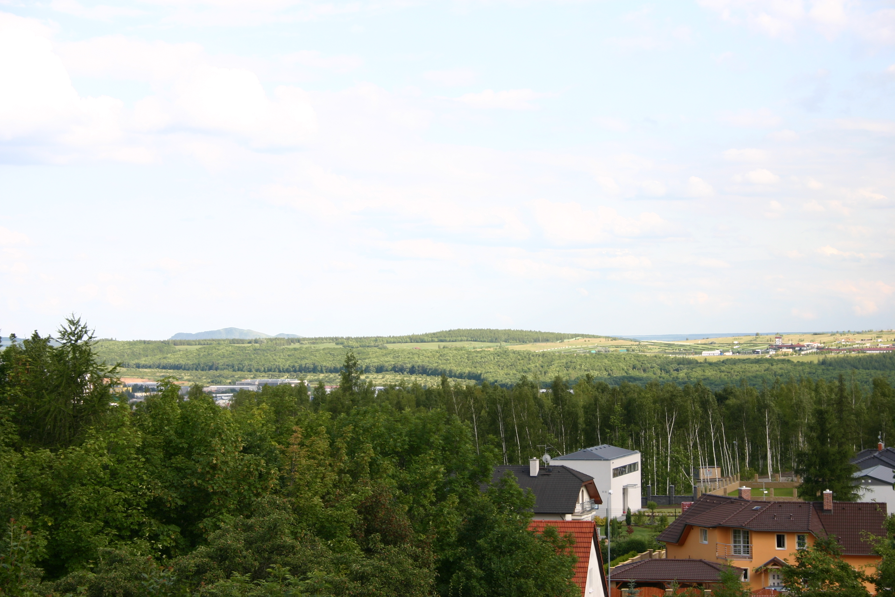 Velebudická výsypka